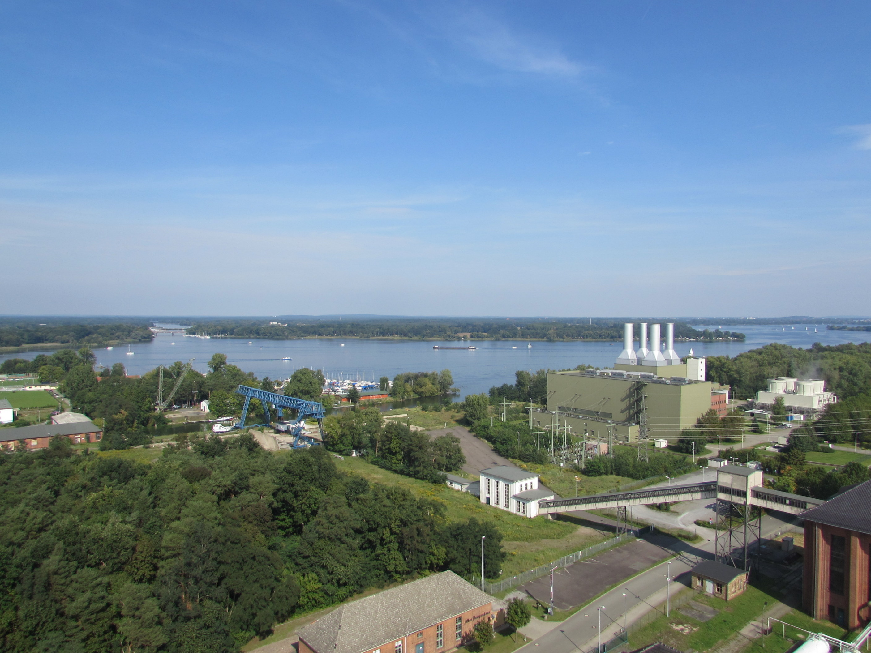 Blick auf den Plauer See in Brandenburg